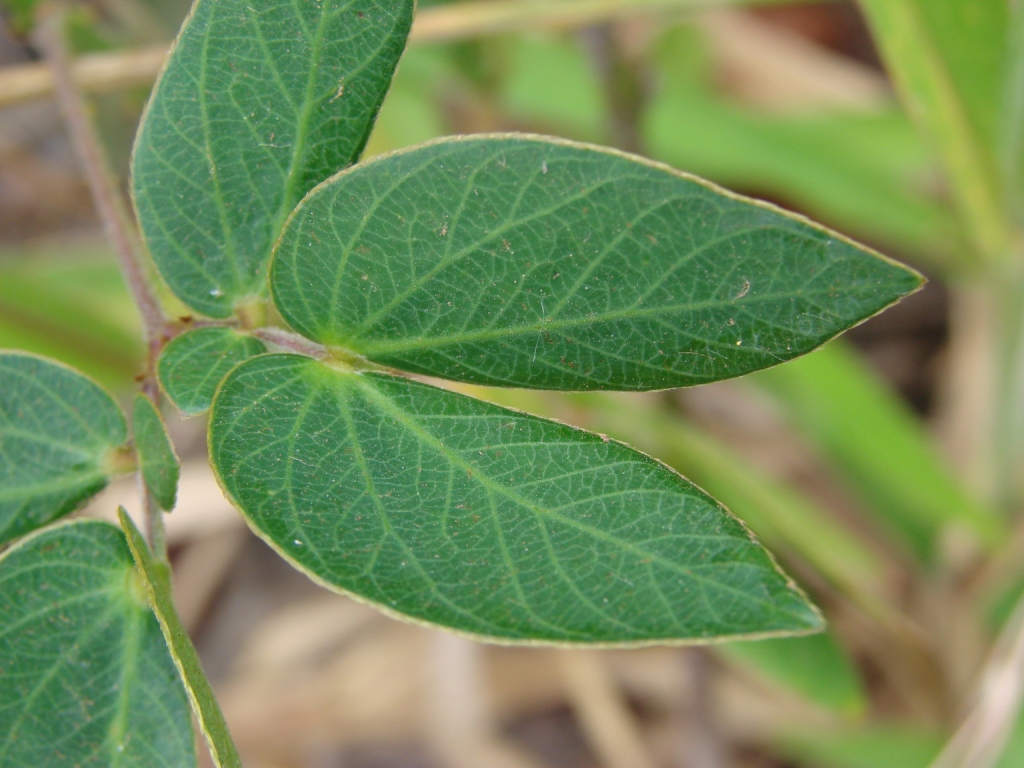 Mimosa nuda - FABACEAE Cachoeira do Tororó - Brasília - Distrito Federal - Brasil.